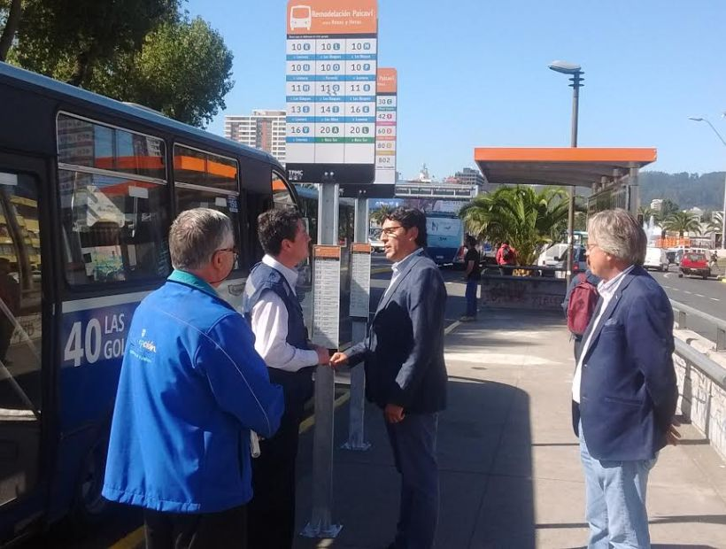 Diseño de los nuevos paraderos mas señaleticas inclusivas